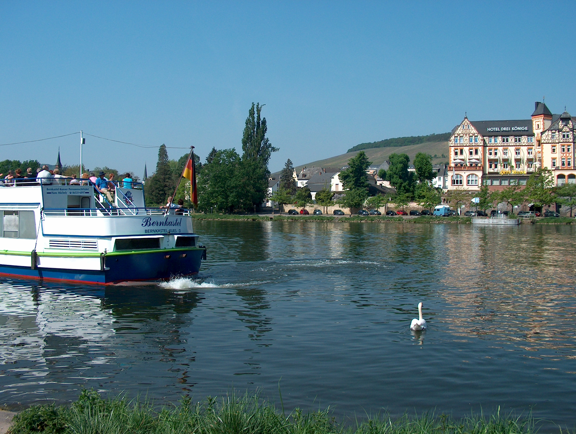 Die Mosel bei Bernkastel-Kues mit Kues im Hintergrund.